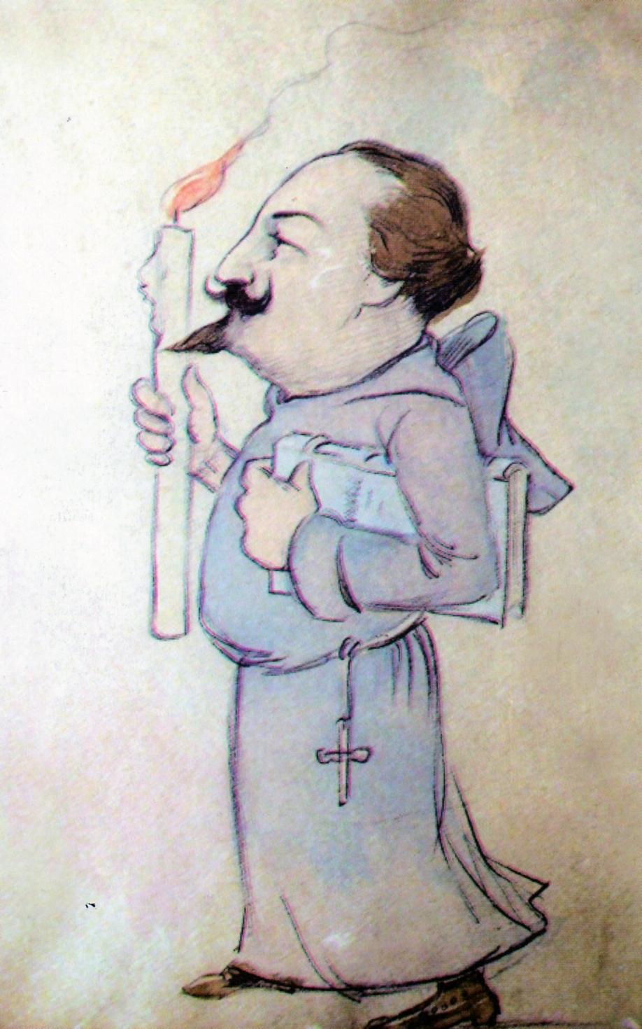 Alexandru Bogdan Pitești